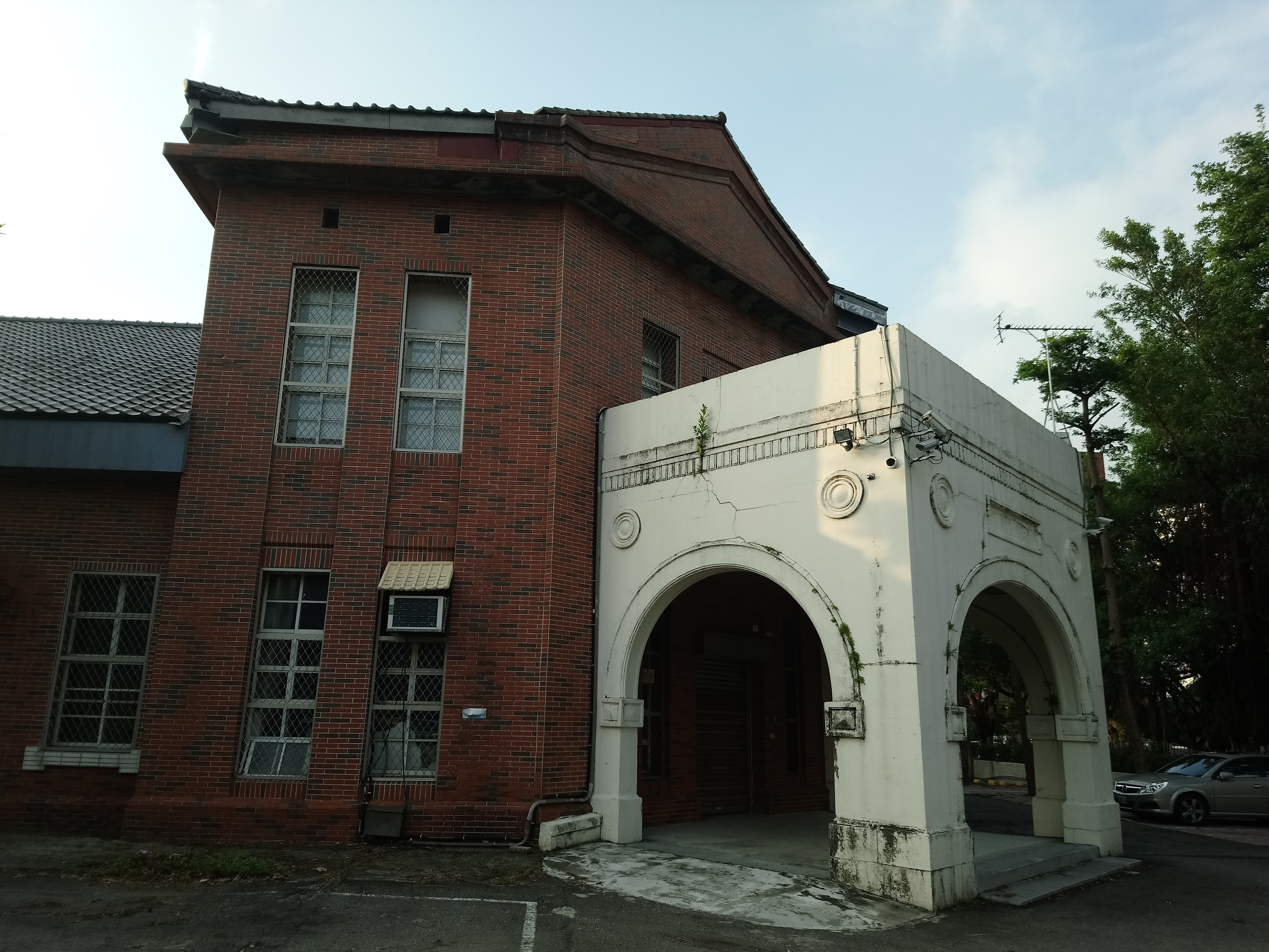 士林公會堂,台北市士林區街上次分區福德里